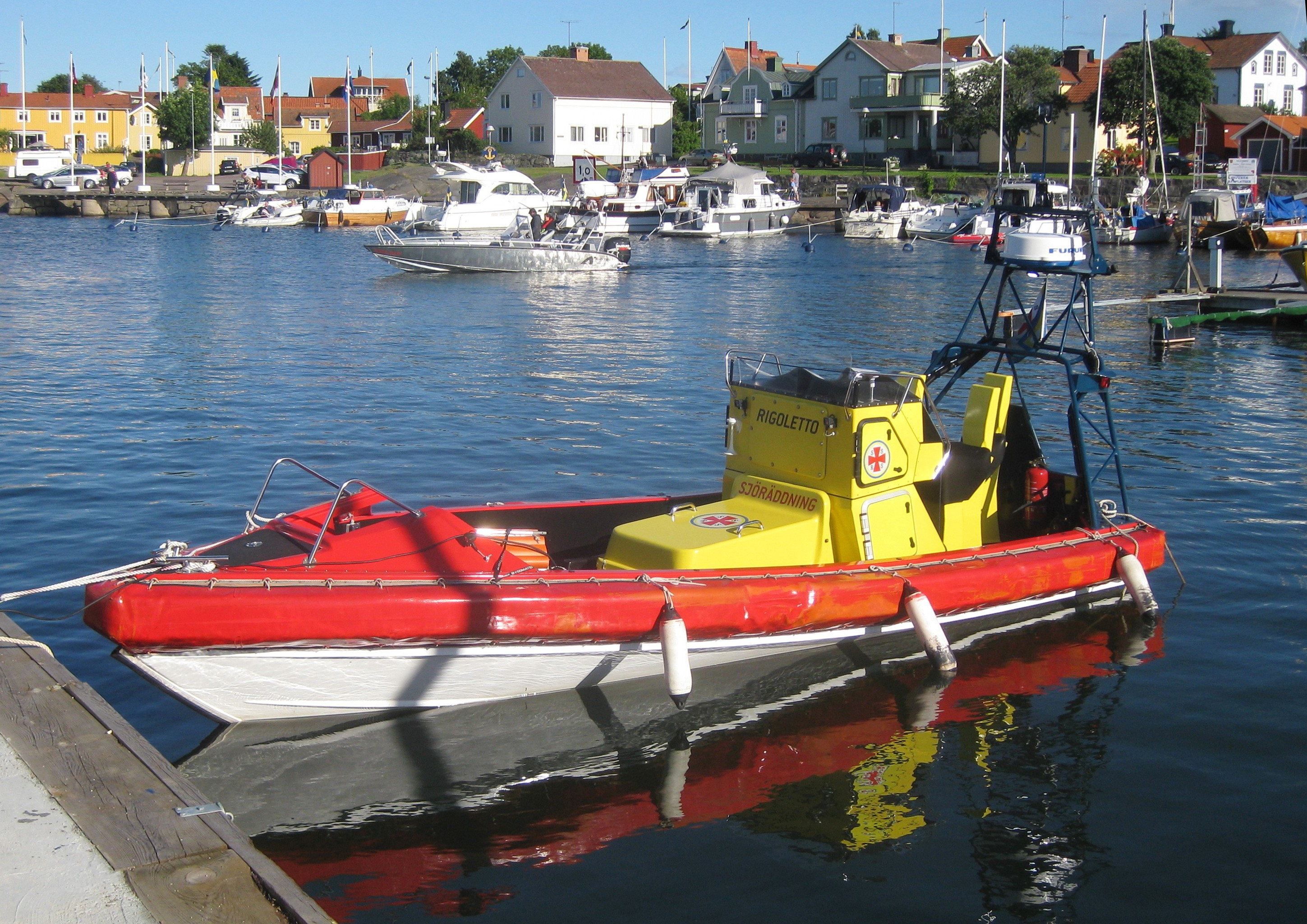 Sjöräddningsbåt i Öregrund